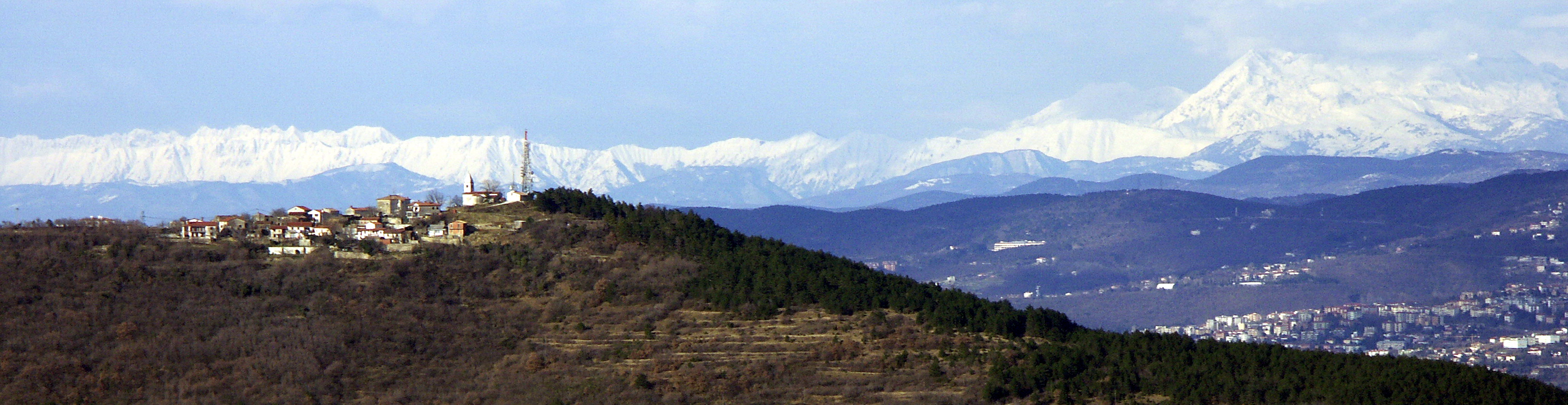 Tinjan in Zahodni Julijci